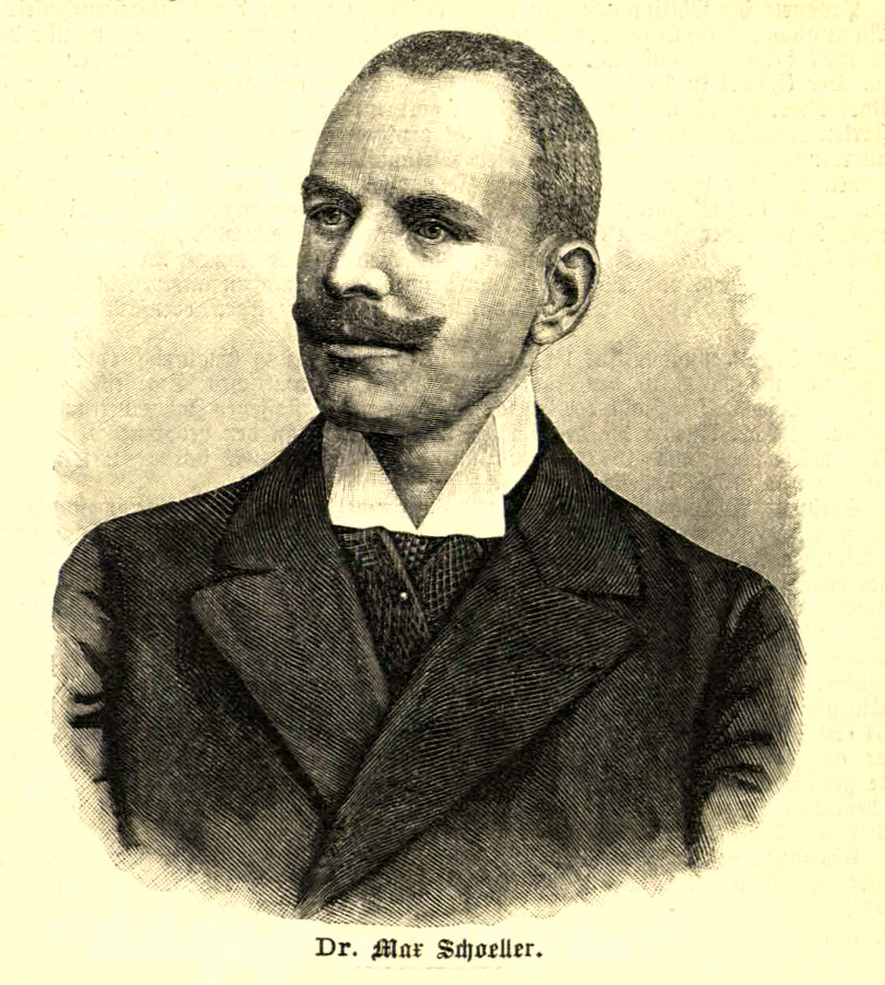 Porträt des Zuckerfabrikanten und Ethnologen Max Schoeller